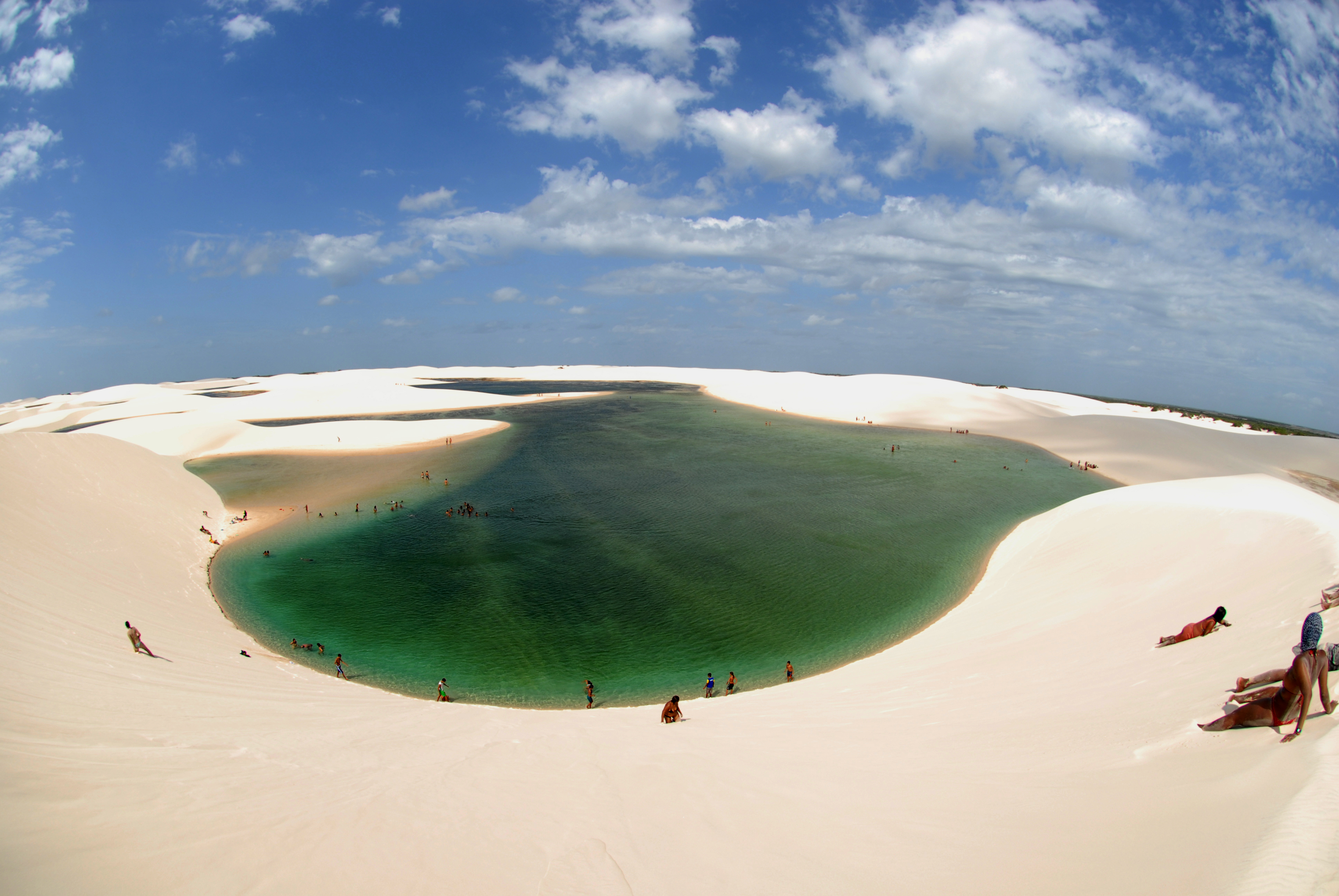 Esta lagoa, próxima à cidade de Santo Amaro, tem essa denominação em função da forma de gaivota que seus contornos revelam